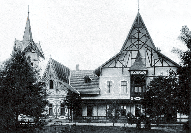 Schloss Berhometh um 1900, Schloss der Freiherren, später Grafen Wassilko von Serecki